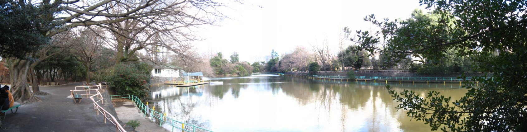 Musashizeki-park